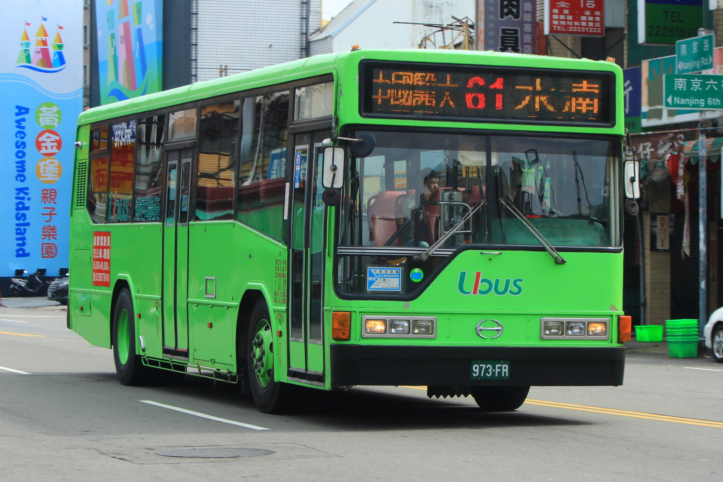 統聯客運2004年日野ERK2JML大客車973-FR。